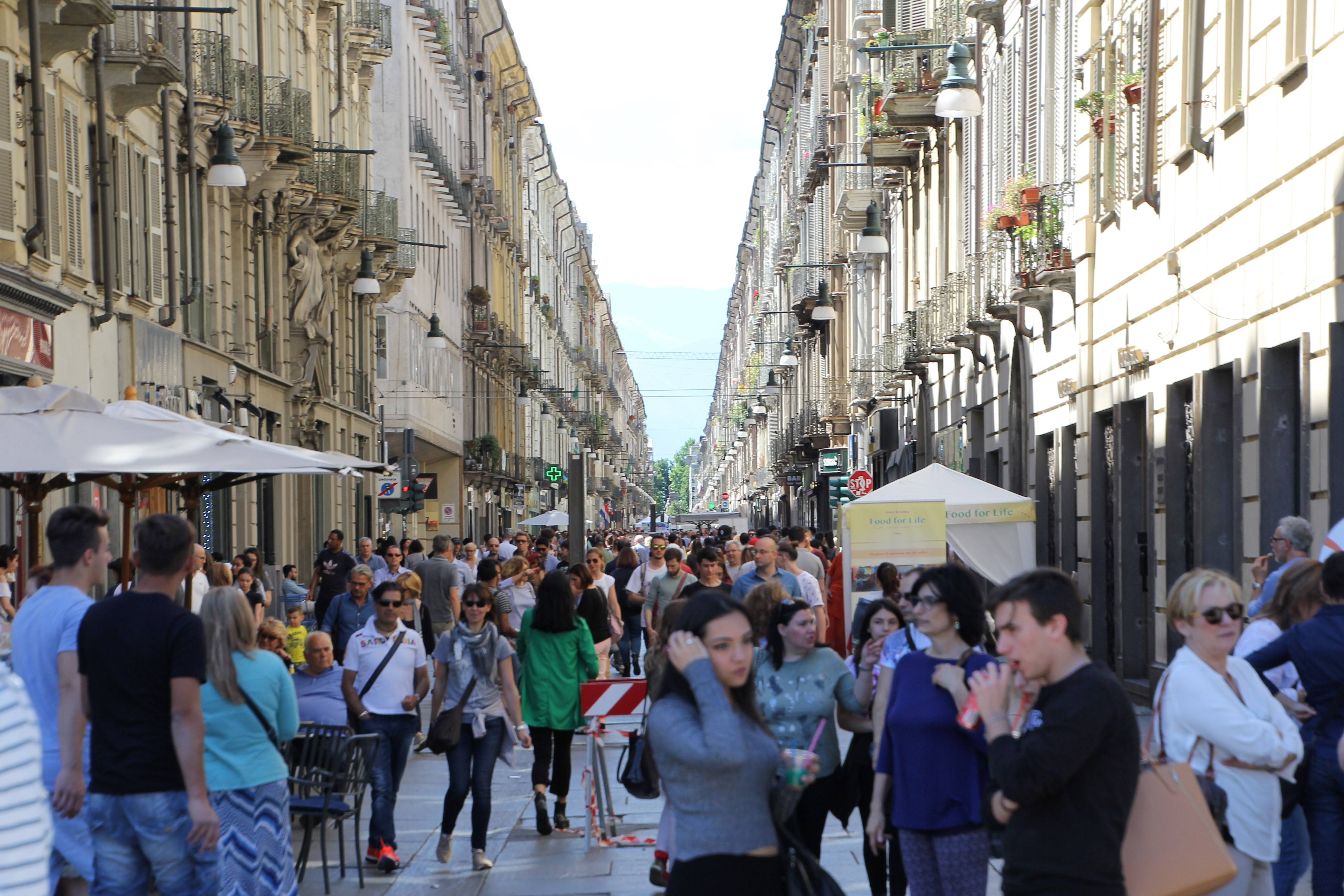 Torino, via Giuseppe Garibaldi